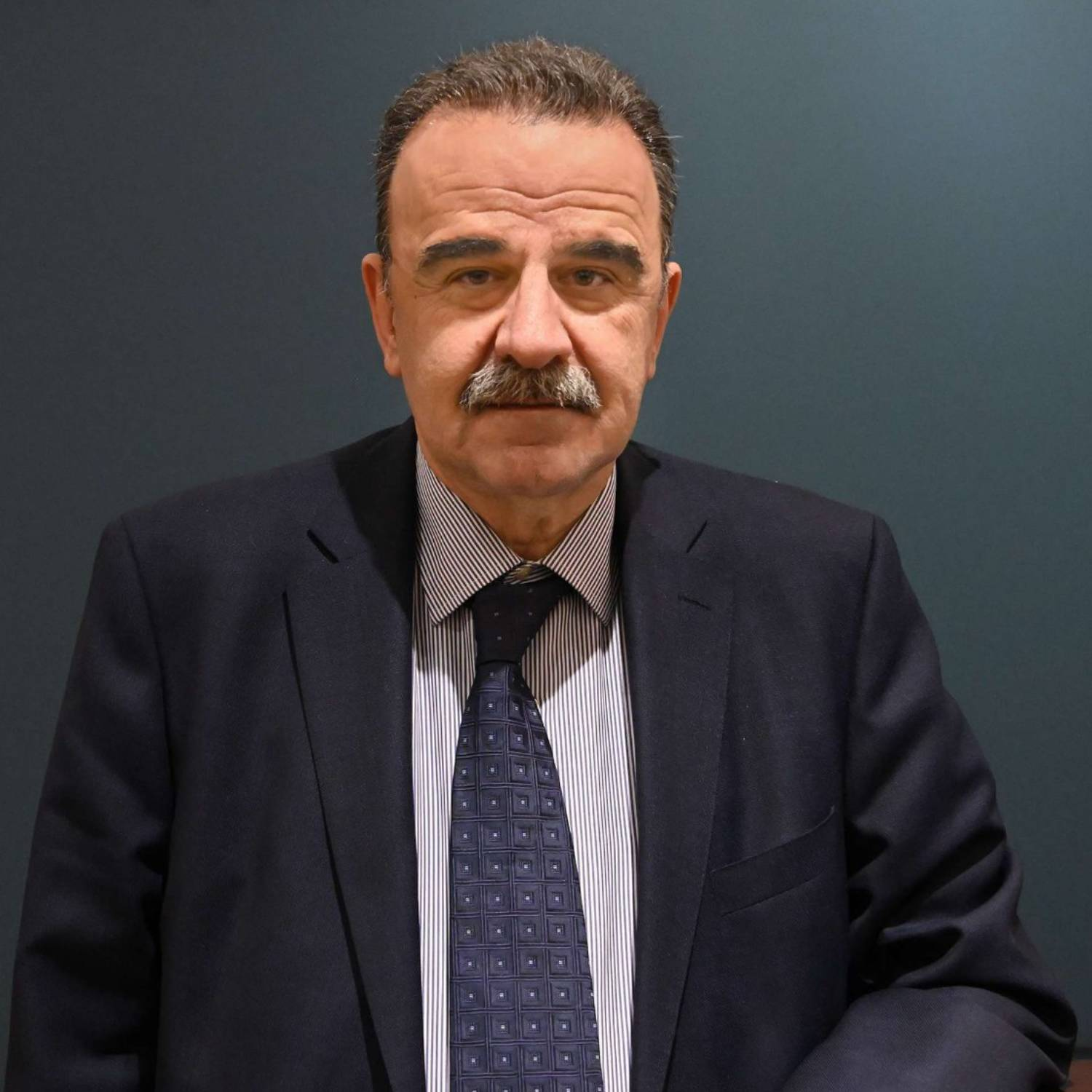 Ιωάννης Κ. Μαντζουράνης